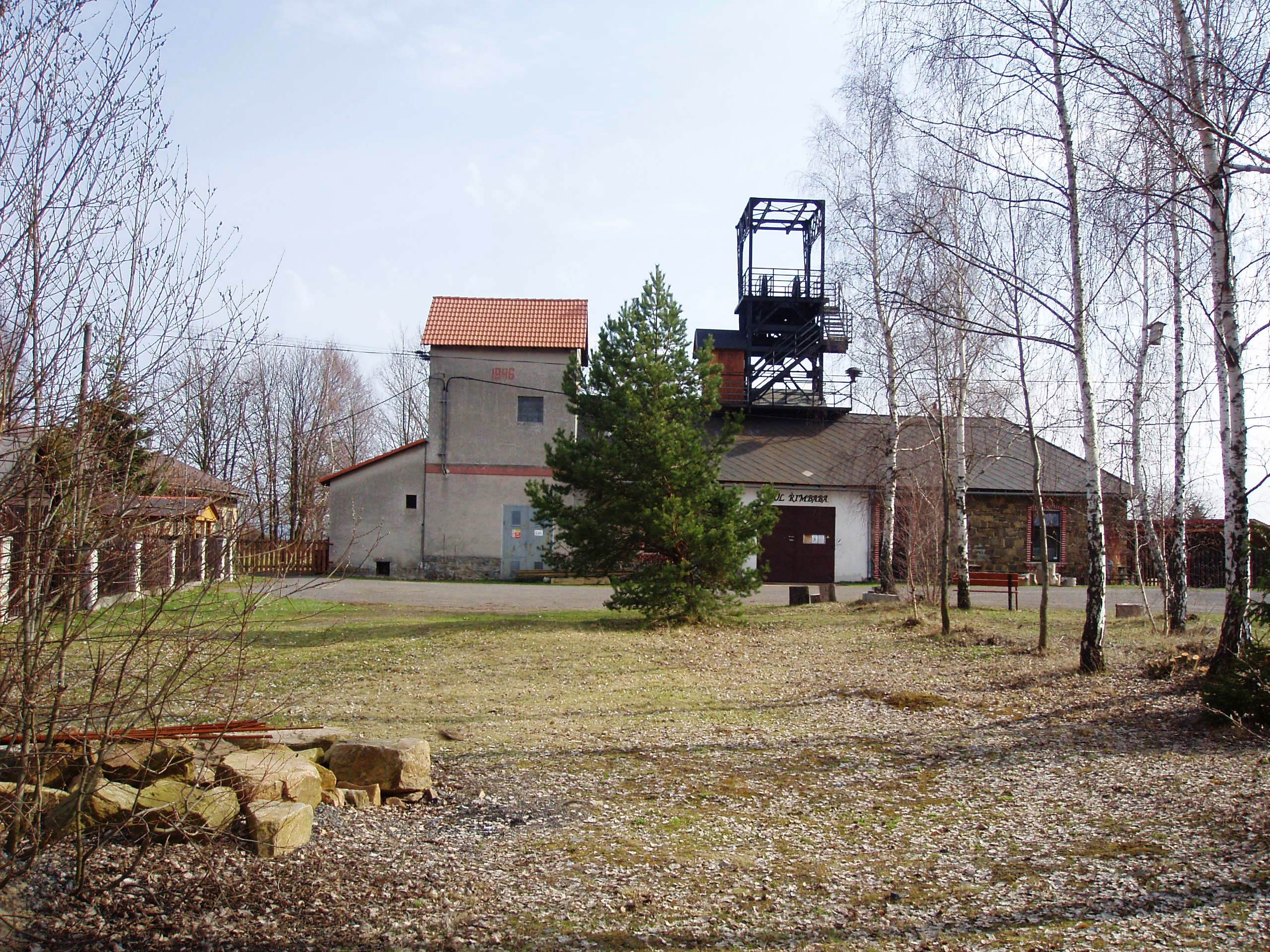 Důl Řimbaba,dnes hornické museum.